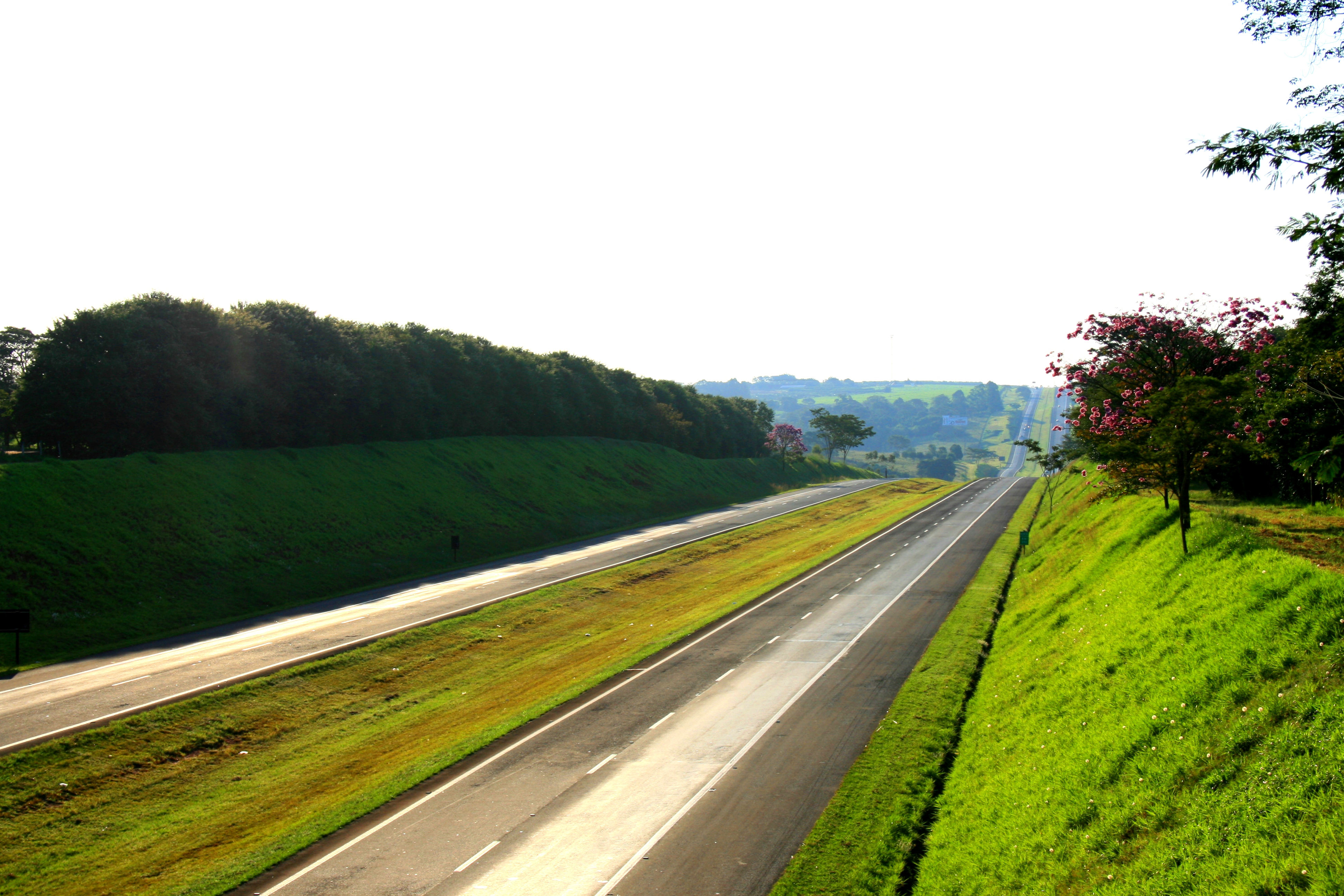 Trecho da Rodovia Washington Luis.